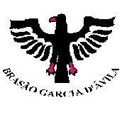 brasão da cidade de dias davila